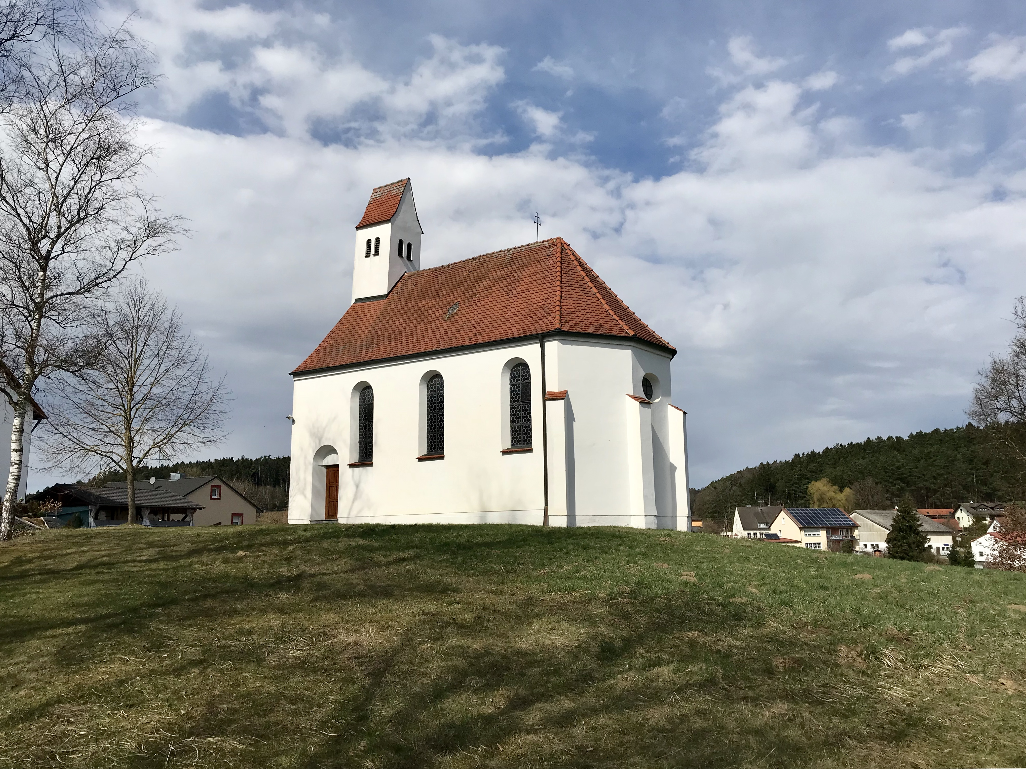 Flachgedeckter Saalbau mit dreiseitigem Schluss und Dachreiter, wohl 15. Jahrhundert, um 1720/30 verändert. Bayerisches Baudenkmal Nr. D-7-71-162-11